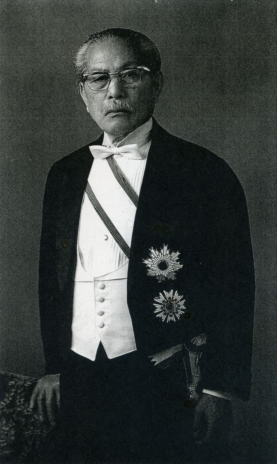 この写真は西尾末広(1891-1981)の1965年のものです。